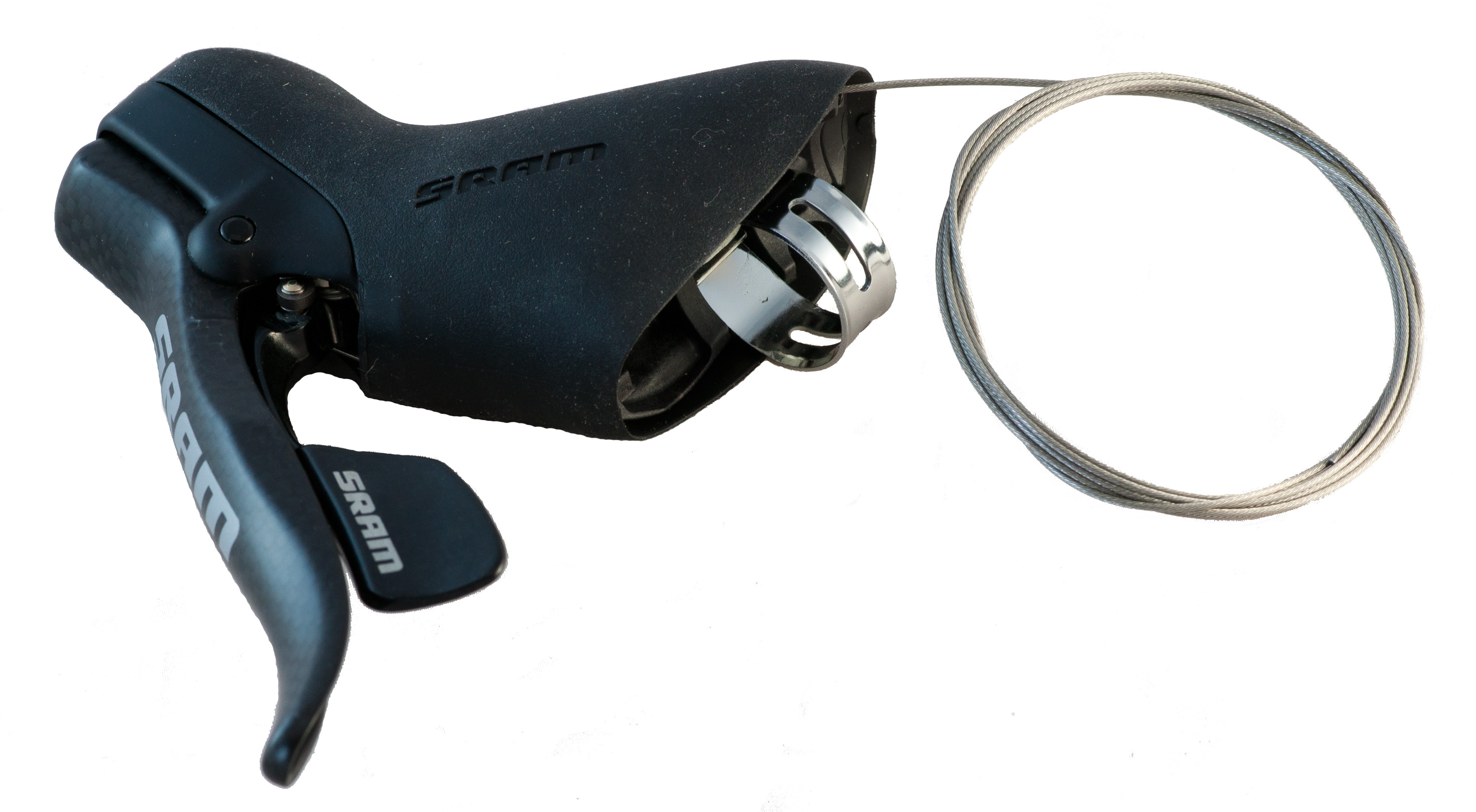 Cocotte SRAM Rival, vue de côté.